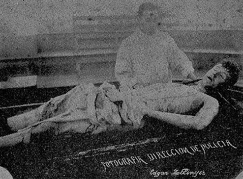 Autopsia del ciudadano suizo inglés Edgar Zollinger, quien murió a manos de la policía tras asesinar al presidente de Guatemala, general José María Reyna Barrios.